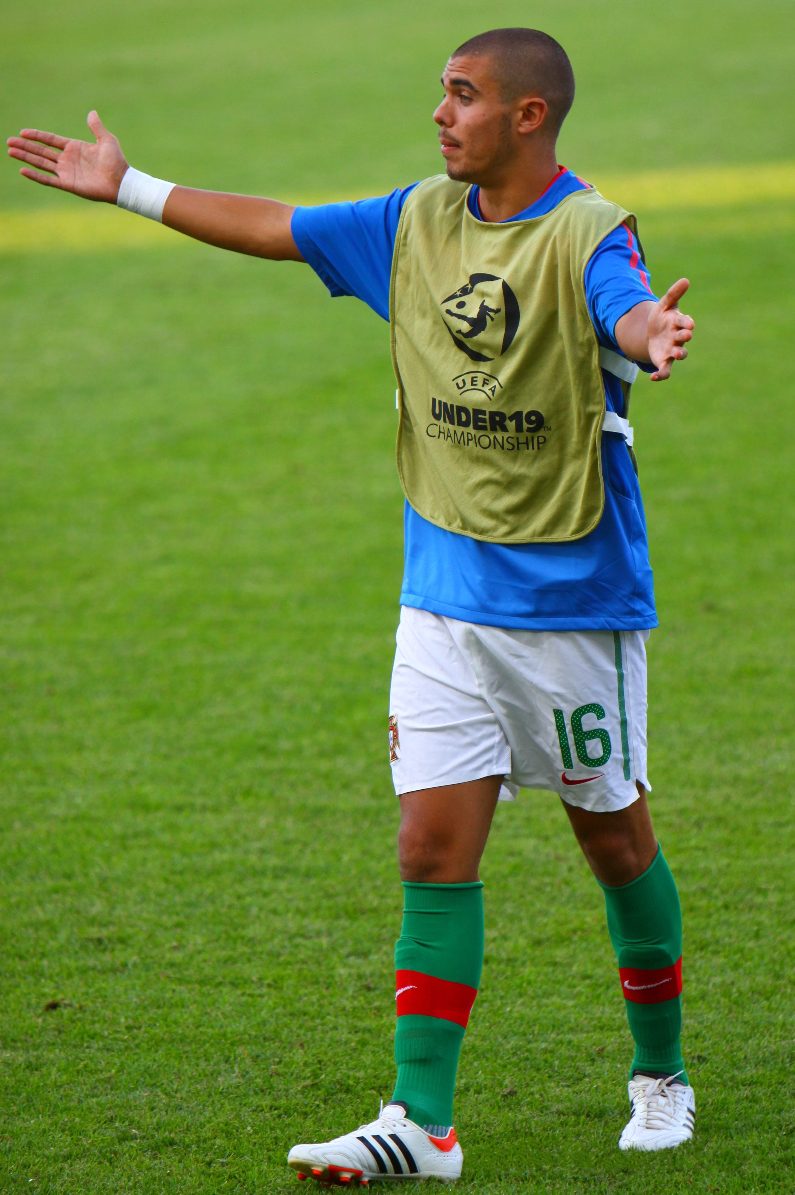 U-19 Portugal vs Spain.